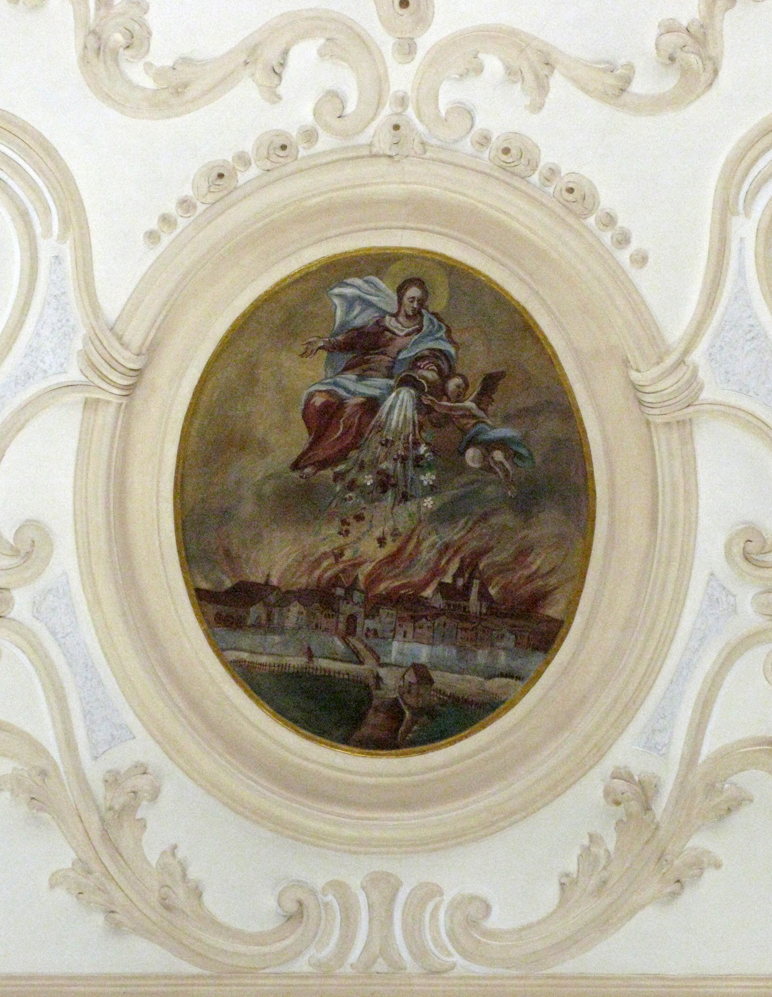 St. Laurentius in Kenzingen, Deckengemälde, Stadtbrand von 1638